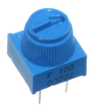 10K trimpot.